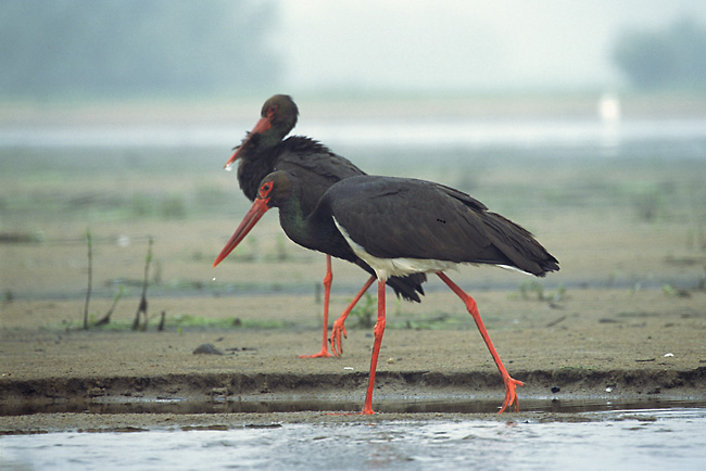 Ciconia nigra